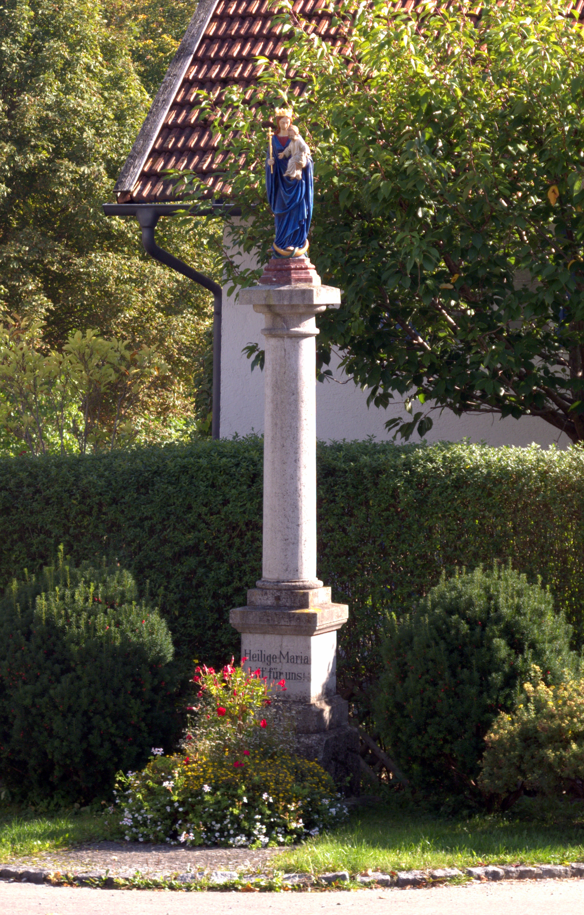 farbiggefasste Madonna auf Steinsäule, 1910